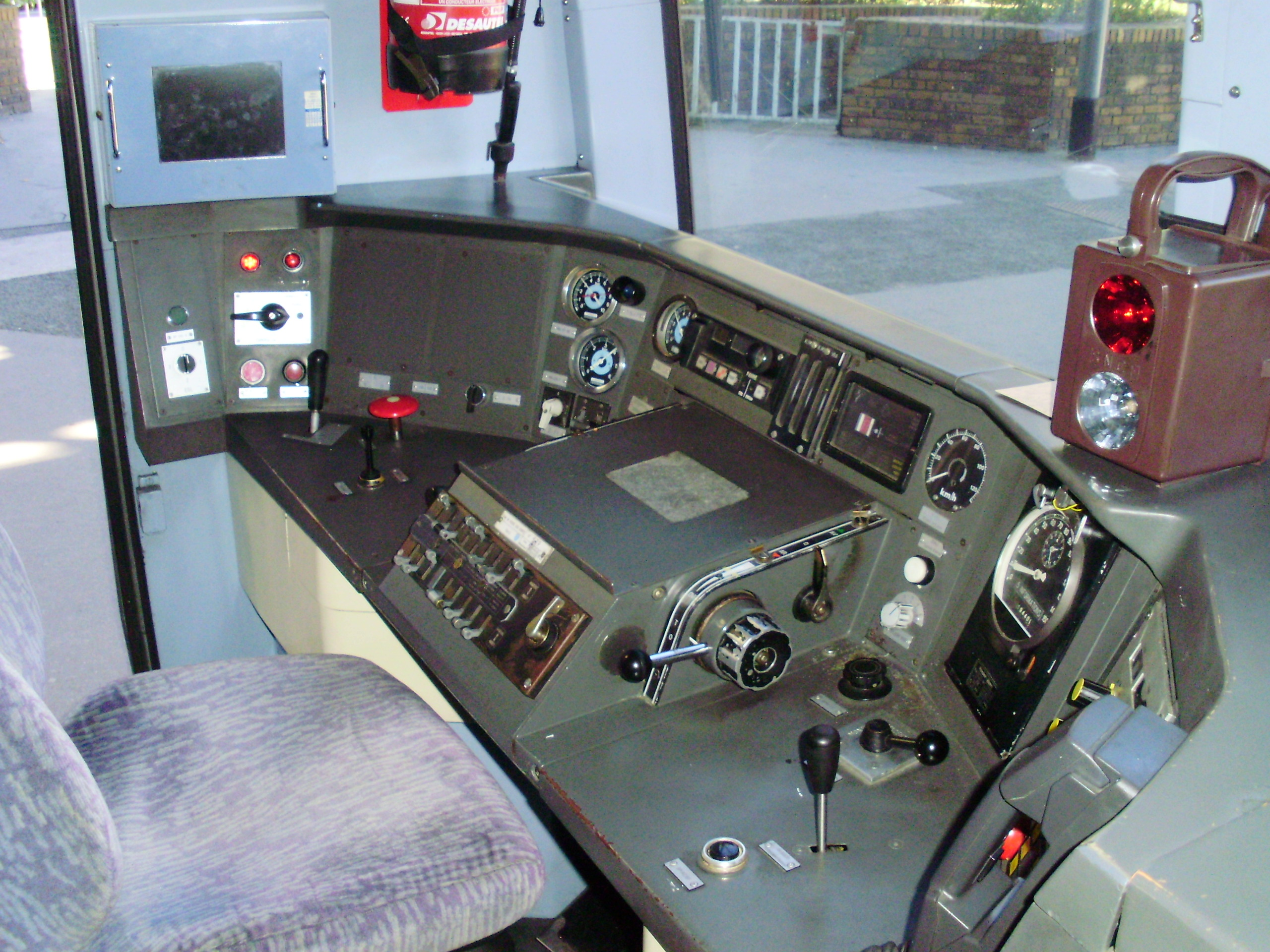 Poste de conduite d'une rame Z 6400, en gare de Paris-Saint-Lazare - Vue à gauche du siège du conducteur